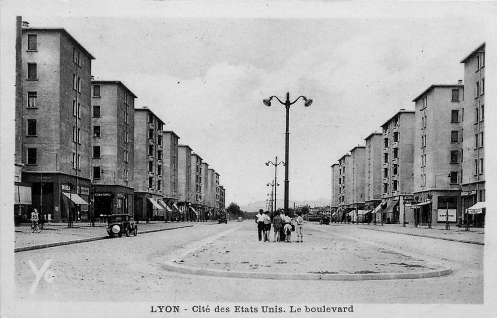 LYON Cité des Etats Unis, le boulevard, à sa création